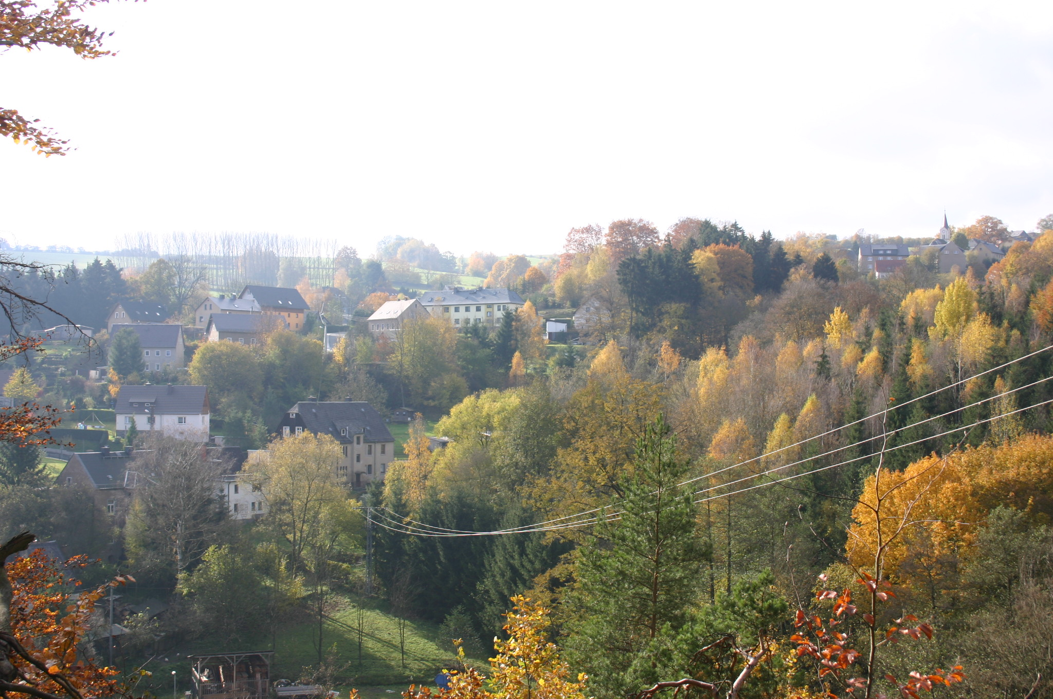 Witzschdorf unterer Ortsteil, gesehen von der Waldstraße (am rechten Bildrand die Witzschdorfer Kirche)